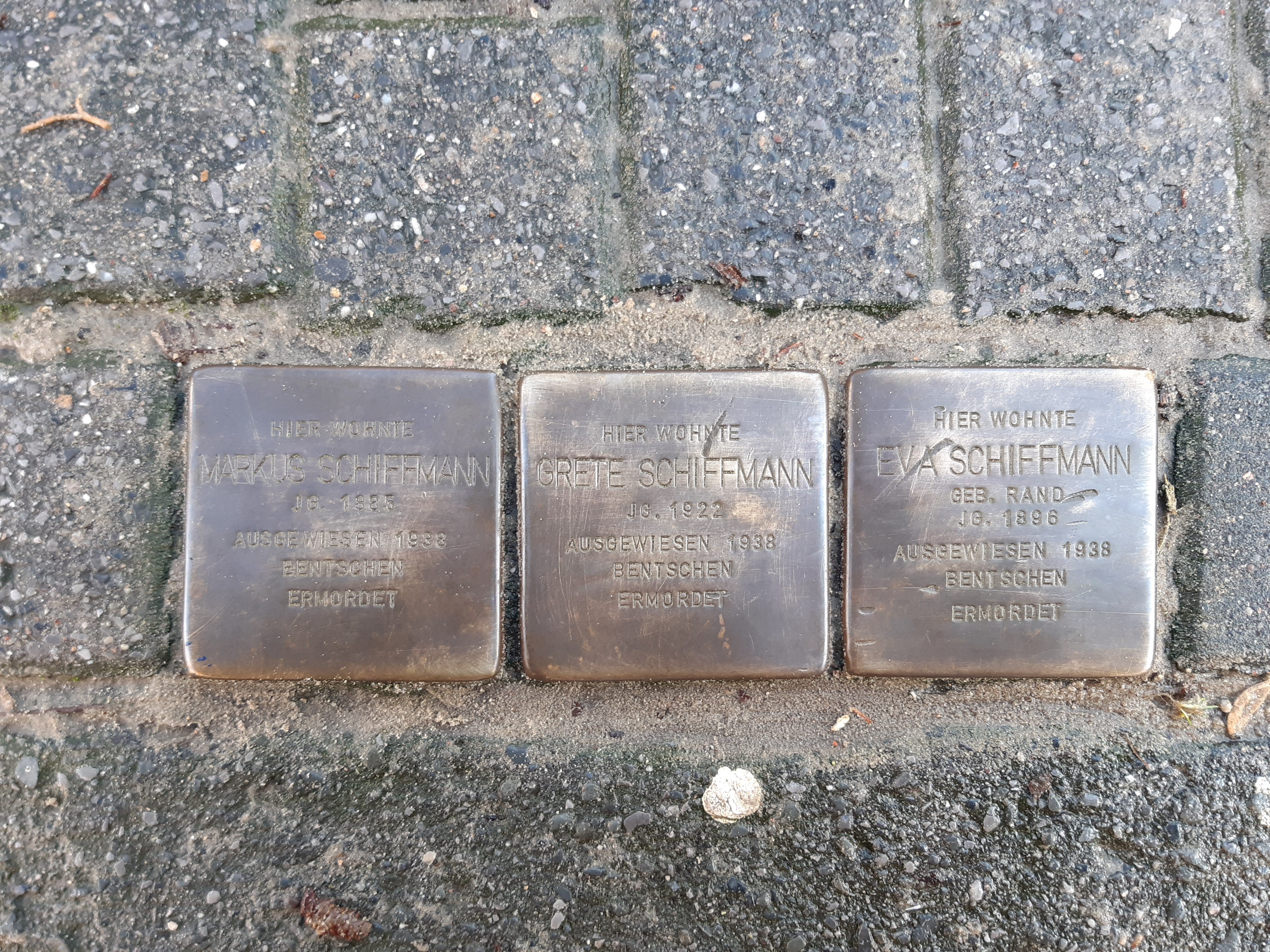 Stolpersteine für Fam. Schiffmann in Dortmund, Lambachstr. 7